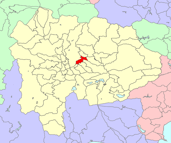 山梨県東八代郡石和町の位置画像。